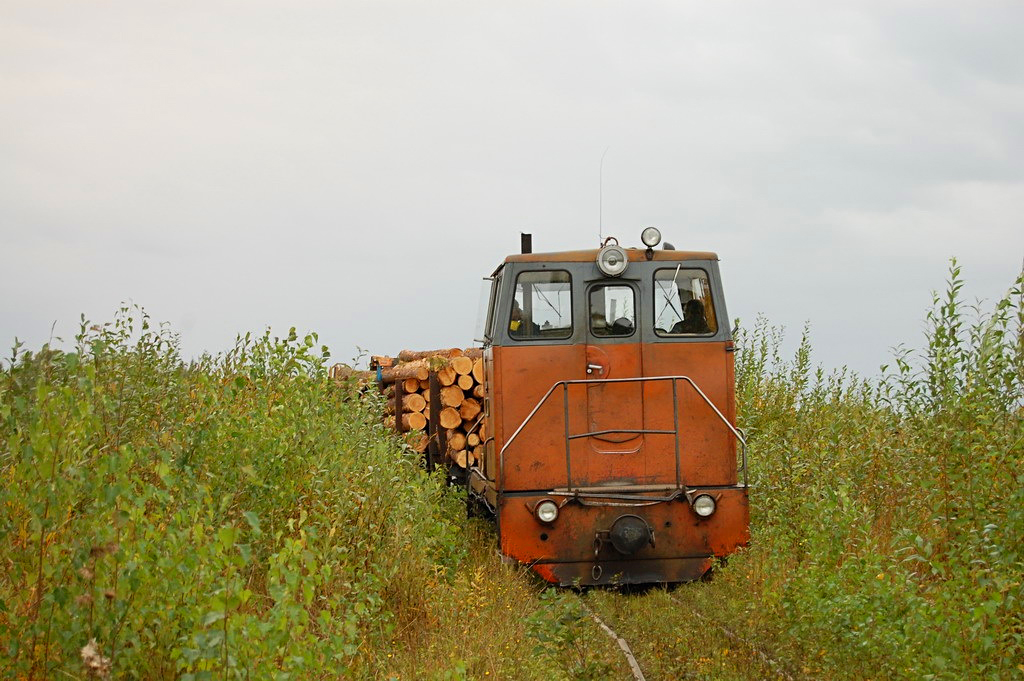 Тепловоз ТУ8 / TU8